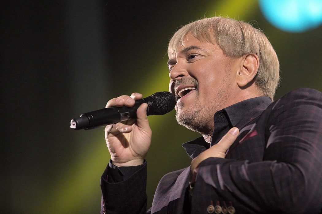 Михайло Грицкан